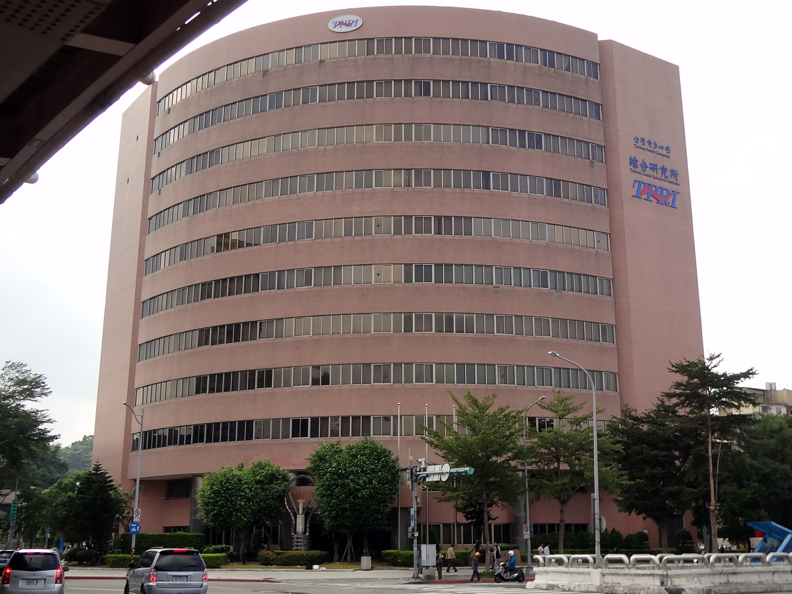 台灣電力公司綜合研究所，位於臺北市中正區羅斯福路四段198號。